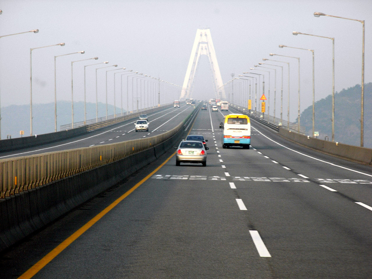 인천국제공항고속도로 영종대교 입구